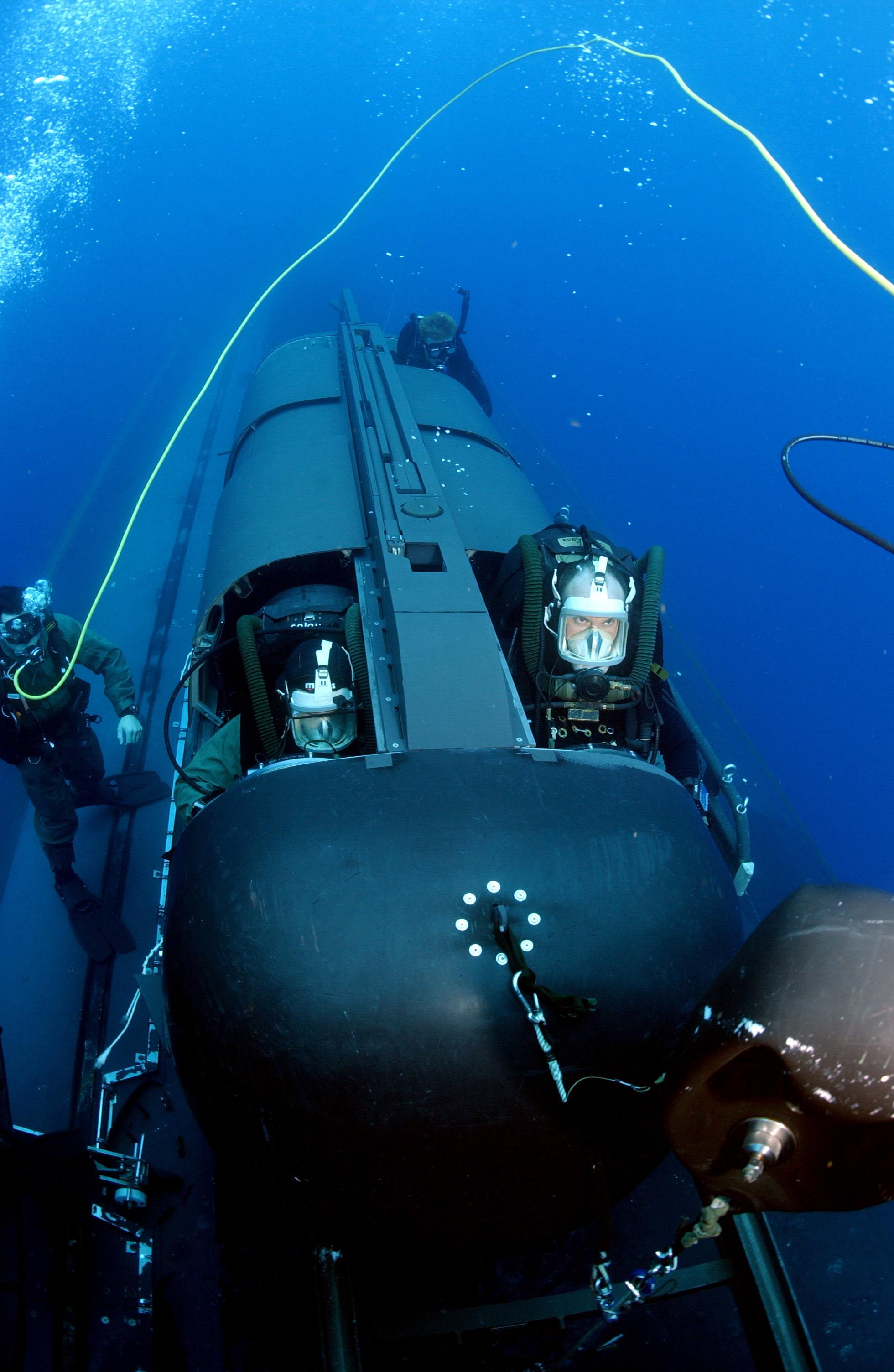 SEAL Delivery Vehicle; public domain